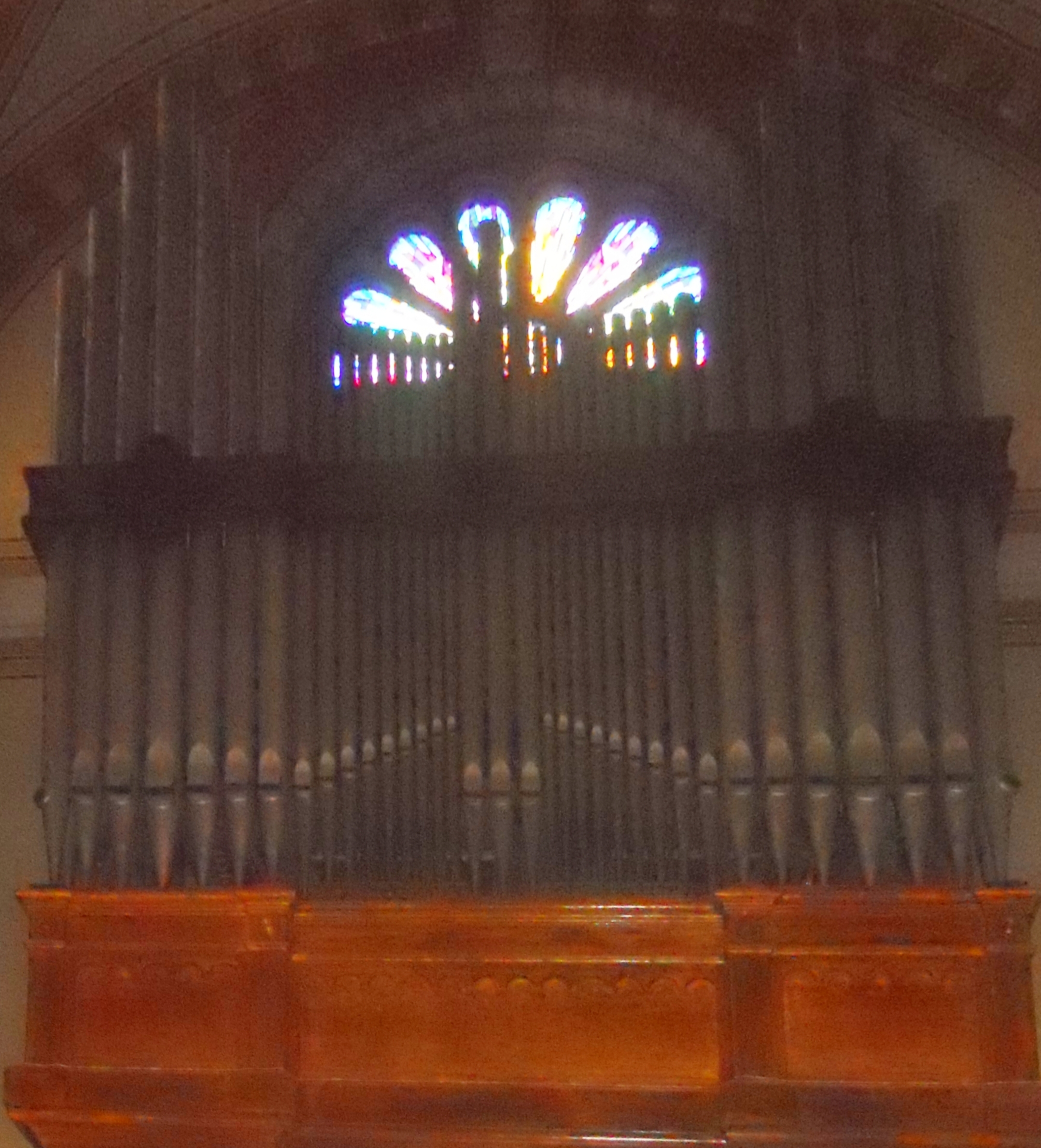 Il corpo in controfacciata dell'organo Balbiani-Vegezzi Bossi della chiesa del Santissimo Redentore a Milano